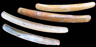 Ensis ensis